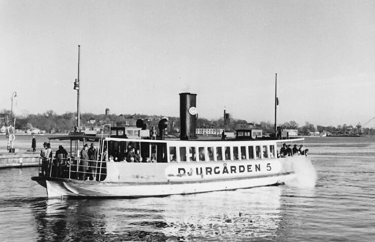 Djurgården 5